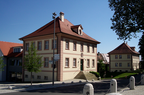 Altshausen, Am Marktplatz